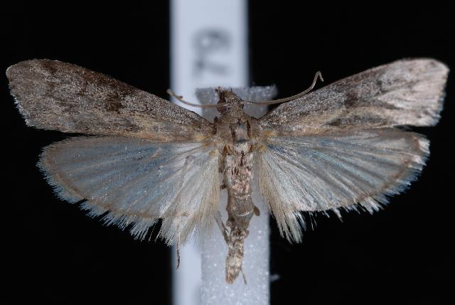 Vitula edmandsii serratilineella